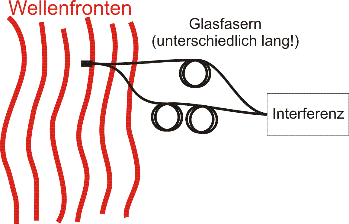 Interferenz zweier Punkte senkrecht zu einer Wellenfront als Bezug zur zeitlichen Kohärenz